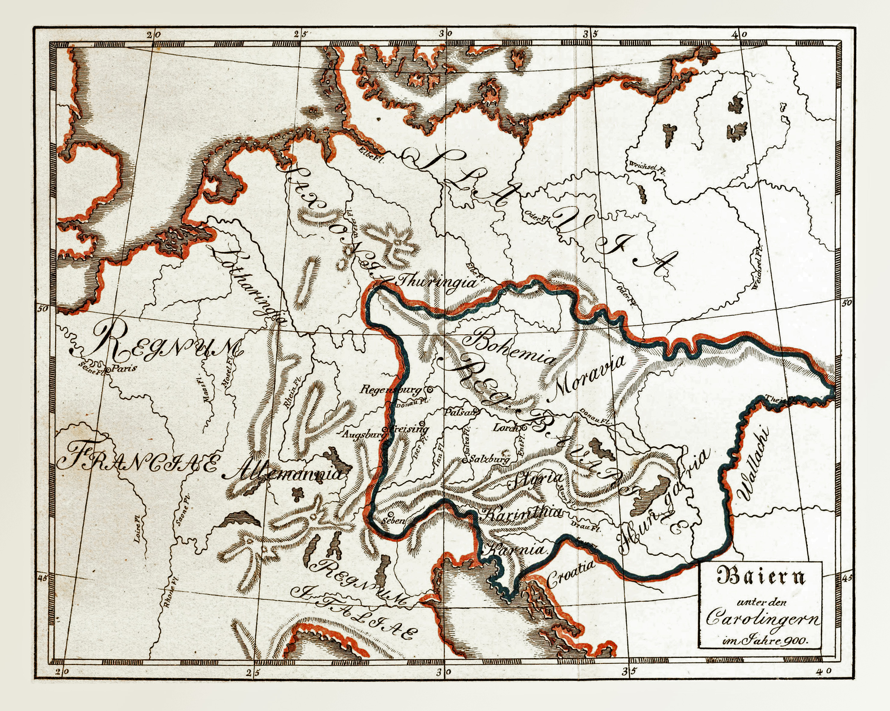 Baiern unter den Carolingern im Jahre 900. Original size 22 by 17 cm, scale 1:7,600,000, further information